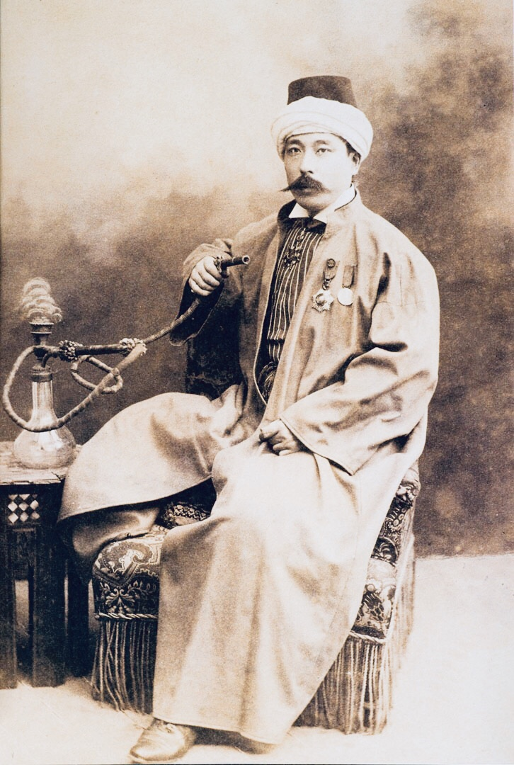 Yamada Torajirō (1866-1957) pendant son séjour à Istanbul de 1892 à 1914.